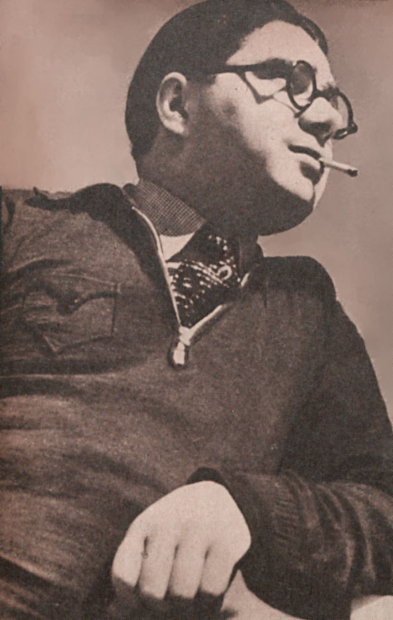 O maestro brasileiro César Guerra-Peixe, em 1944.